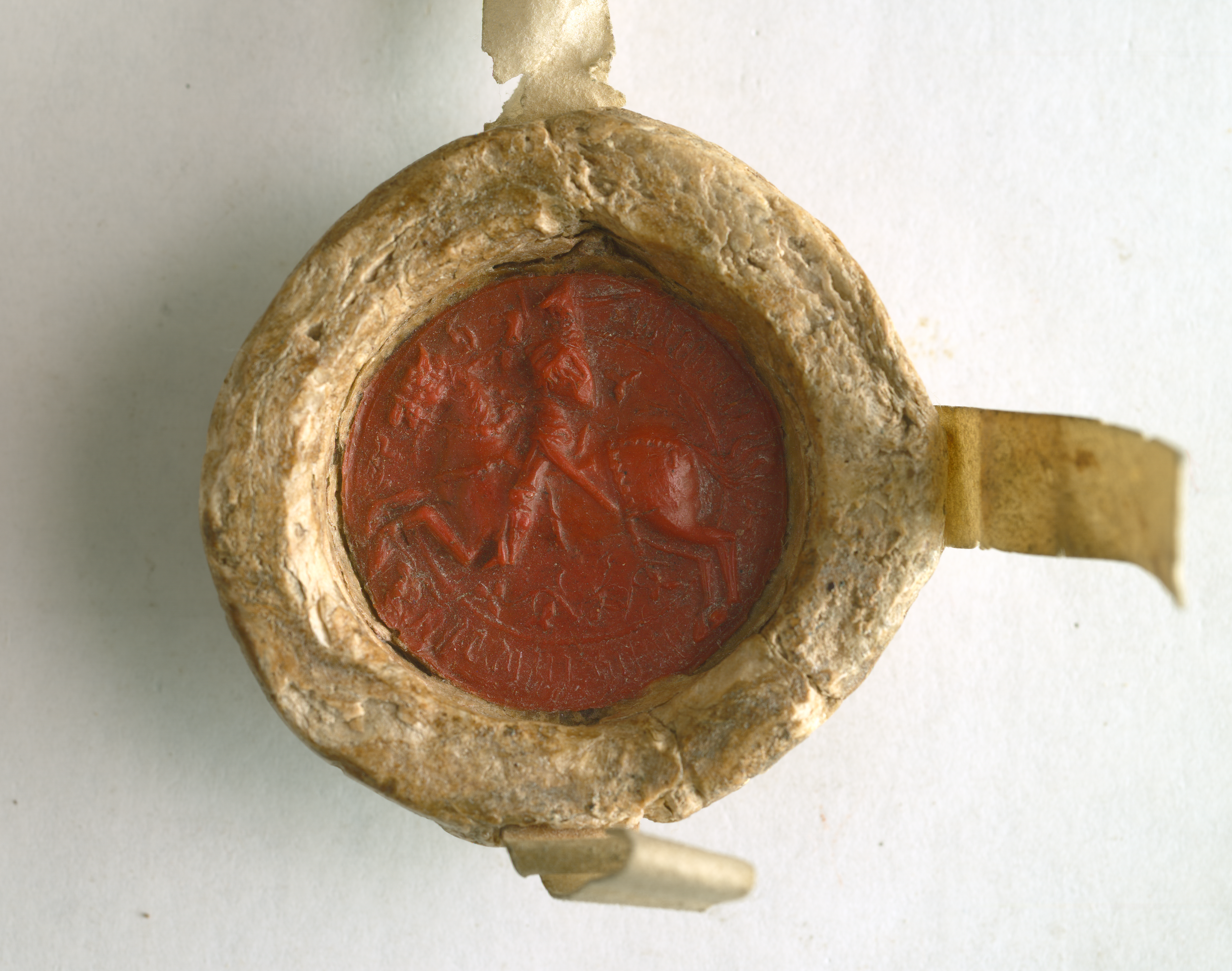 Pieczęć konna Witolda, wielkiego księcia litewskiego, odcisk w czerwonym wosku, pieczęć przywieszona na pasku pergaminowym; legenda: s wytoldi ducis lithvanie.